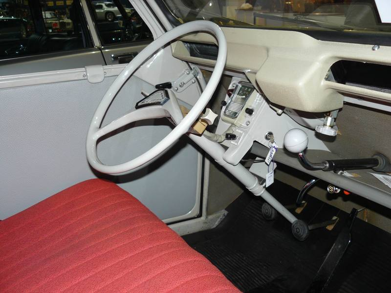 Retromobile 2012